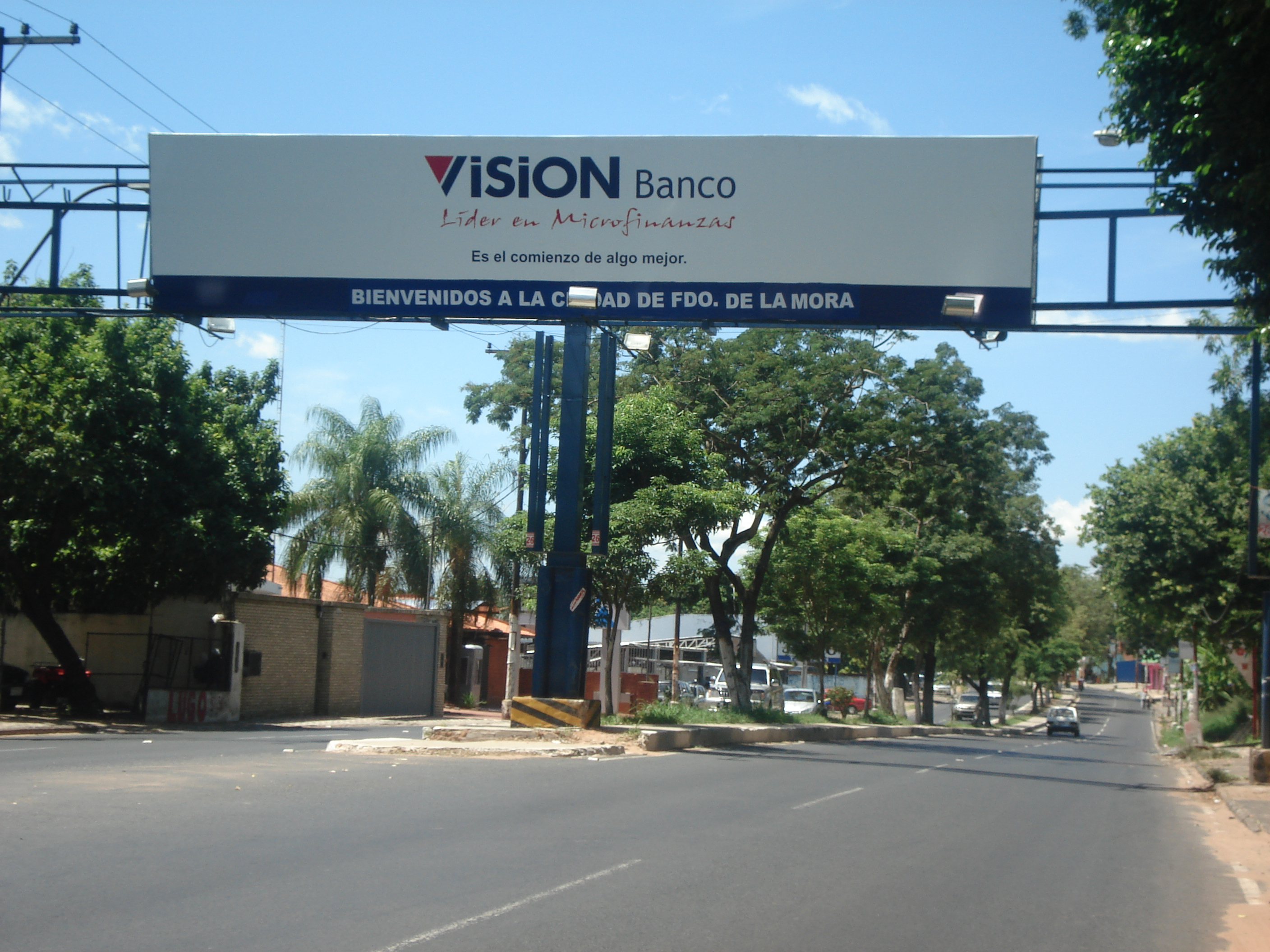 Entrada a Fernando de la Mora